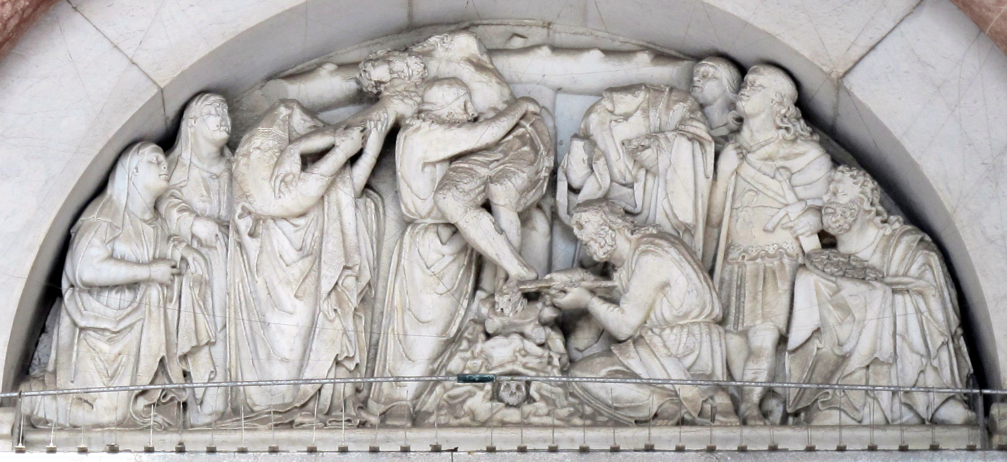 Duomo di Lucca